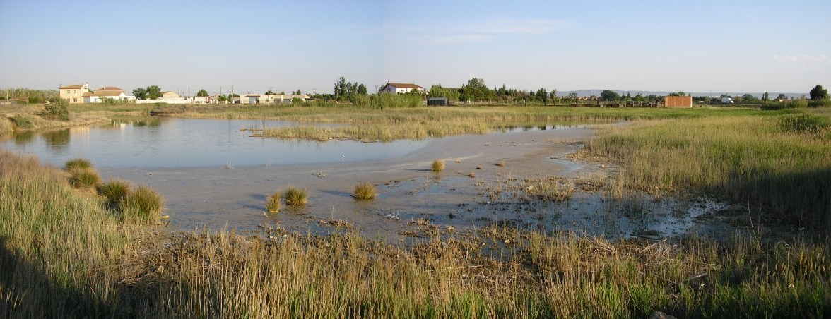 Humedal de alto valor ecológico sito en el barrio de Casetas (Zaragoza)